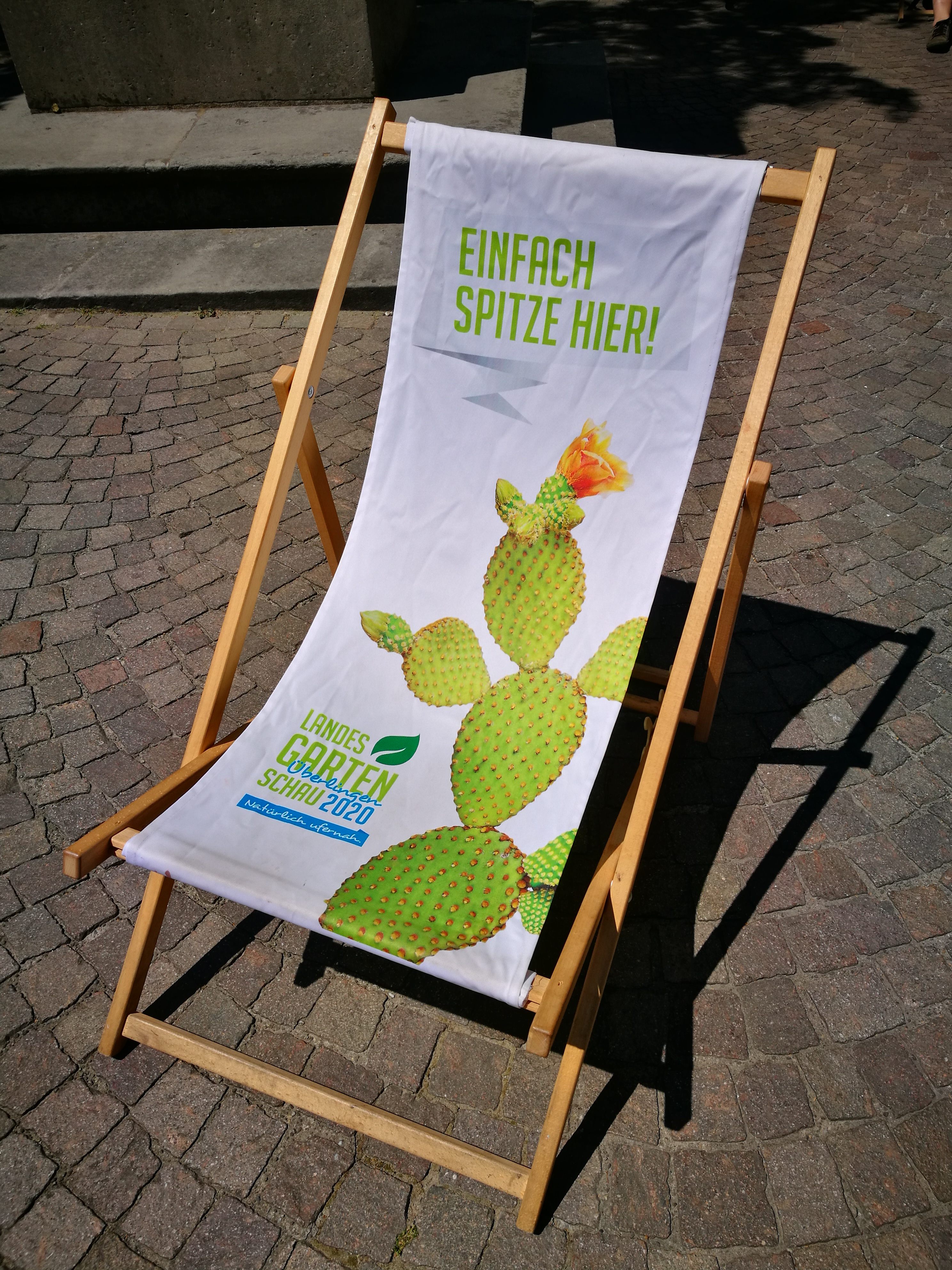 Deutschland (D) - Baden-Württemberg (BW) - Bodenseekreis (FN) - Überlingen: Liegestuhl mit Werbung für die Landesgartenschau 2020